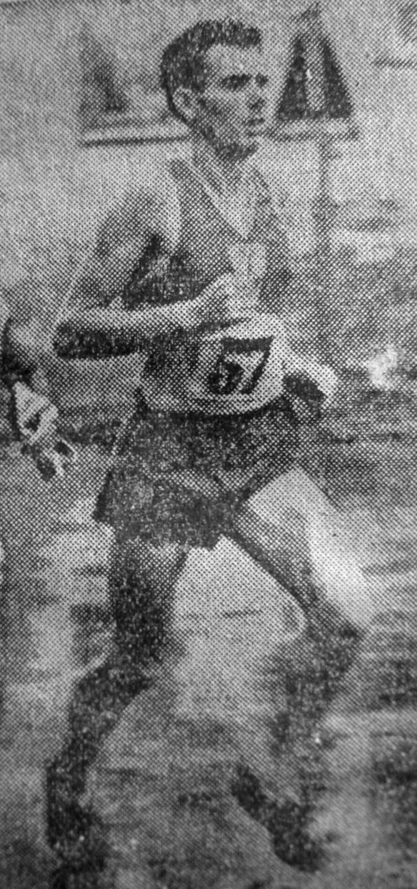 L'atleta italiano Asfò Bussotti durante i Giochi olimpici di Helsinki 1952.